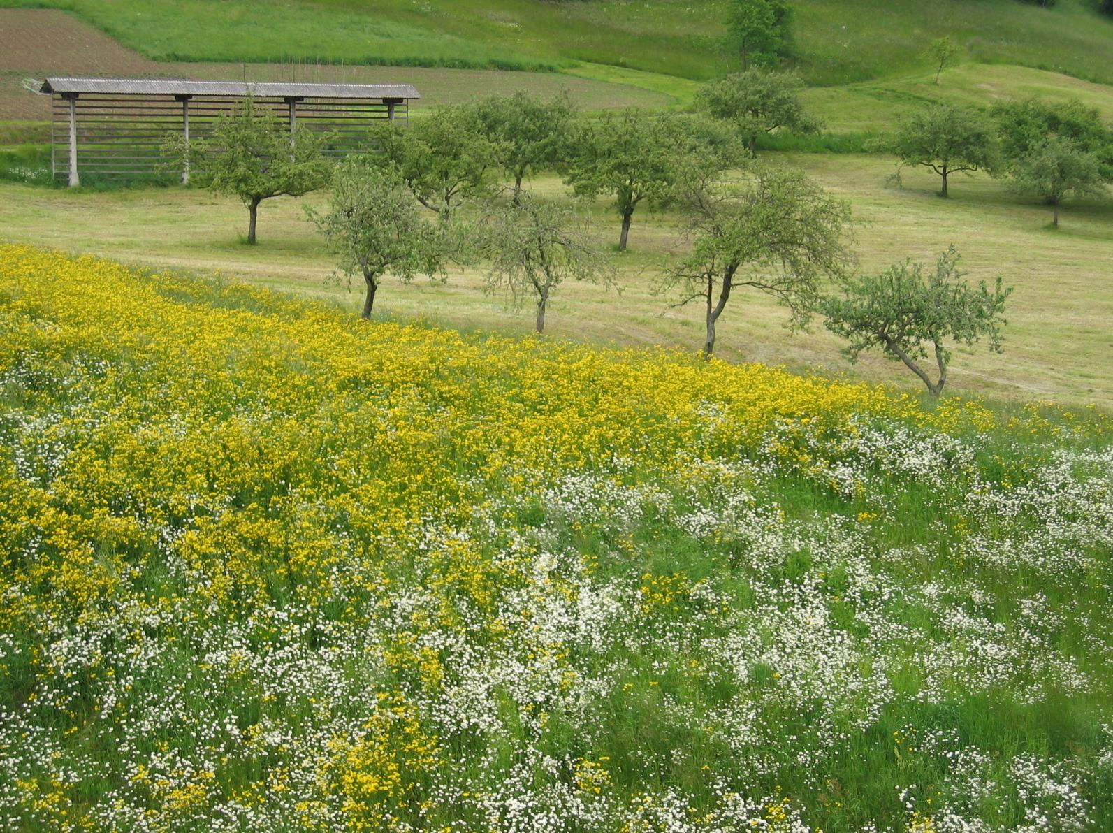 landscape at Motnik village, Slovenia photo:Ziga 09:22, 10 October 2006 (UTC)